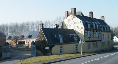 L'ancien relais de poste de Bernay, Somme, France, sur l'ancienne Route Nationale 1.